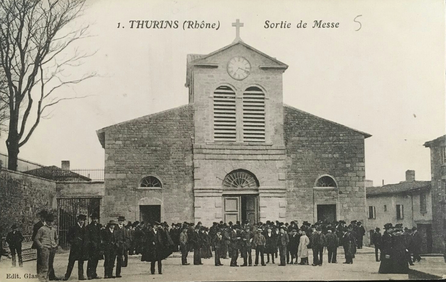 Sortie de messe à l'église Saint-Martin de Thurins vers 1910. Le clocher n'est pas encore construit.